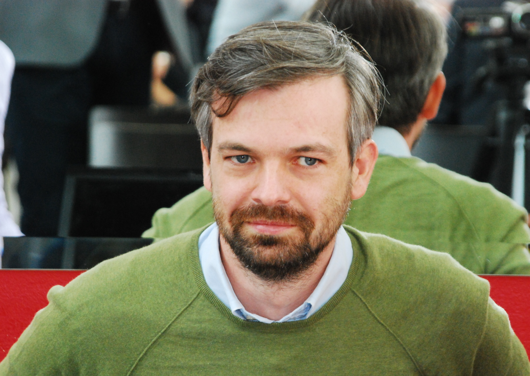 Martin Ehrenhauser bei einer Pressekonferenz im Cafe Leopold im Museumsquartier in Wien